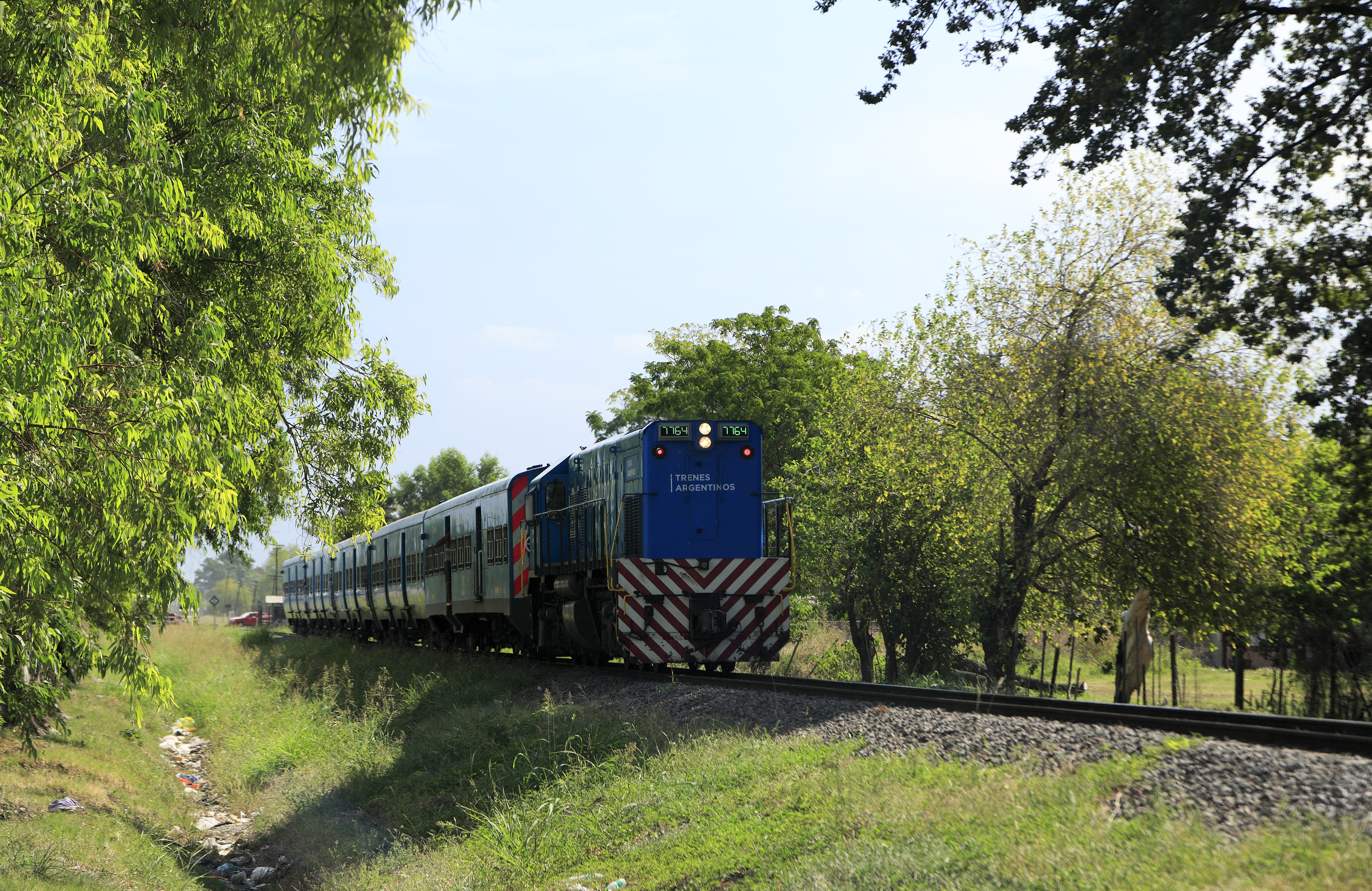 Línea Belgrano Sur, nördliche Zweigstrecke. Zum Aufnahmezeitpunkt verkehren auf dem Streckenast nach Marinos del Crucero General Belgrano vorwiegend lokbespannte Wagenzüge. Der Endabschnitt ab Libertad ist noch immer eingleisig. Wegen der fehlenden Drehmöglichkeiten fahren die Lokomotiven regelmäßig mit dem Vorbau voraus, obwohl das in Bezug auf die Streckensicht ausgesprochen nachteilig ist und die zusätzliche Besetzung mit einem Beimann erfordert.Zugfahrt stadteinwärts Richtung Bahnhof Buenos Aires.